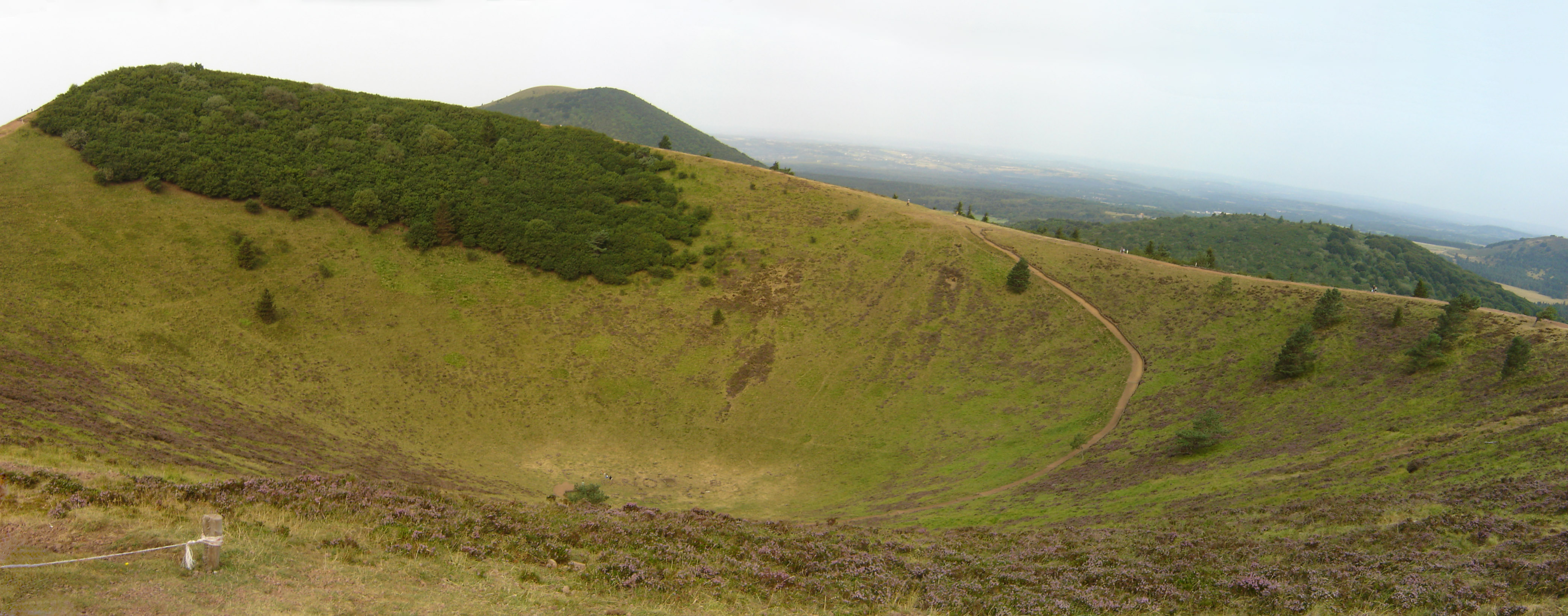 Panorama du cratère du Puy Pariou